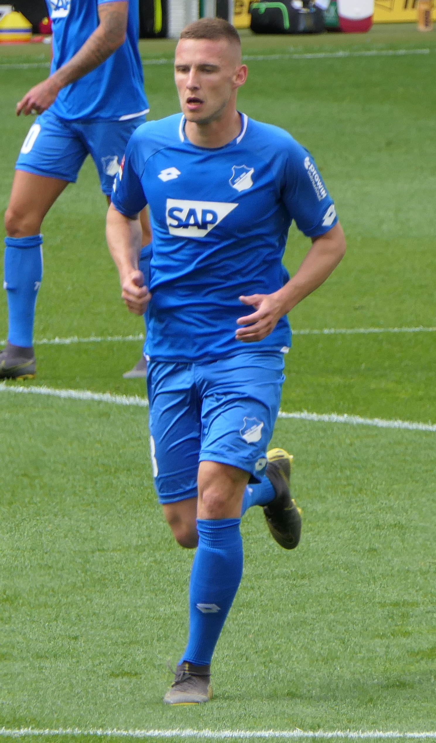 Der Fussballprofi Pavel Kadeřábek im Trikot der TSG 1899 Hoffenheim beim Heimspiel gegen den SV Werder Bremen am 11.05.2019.